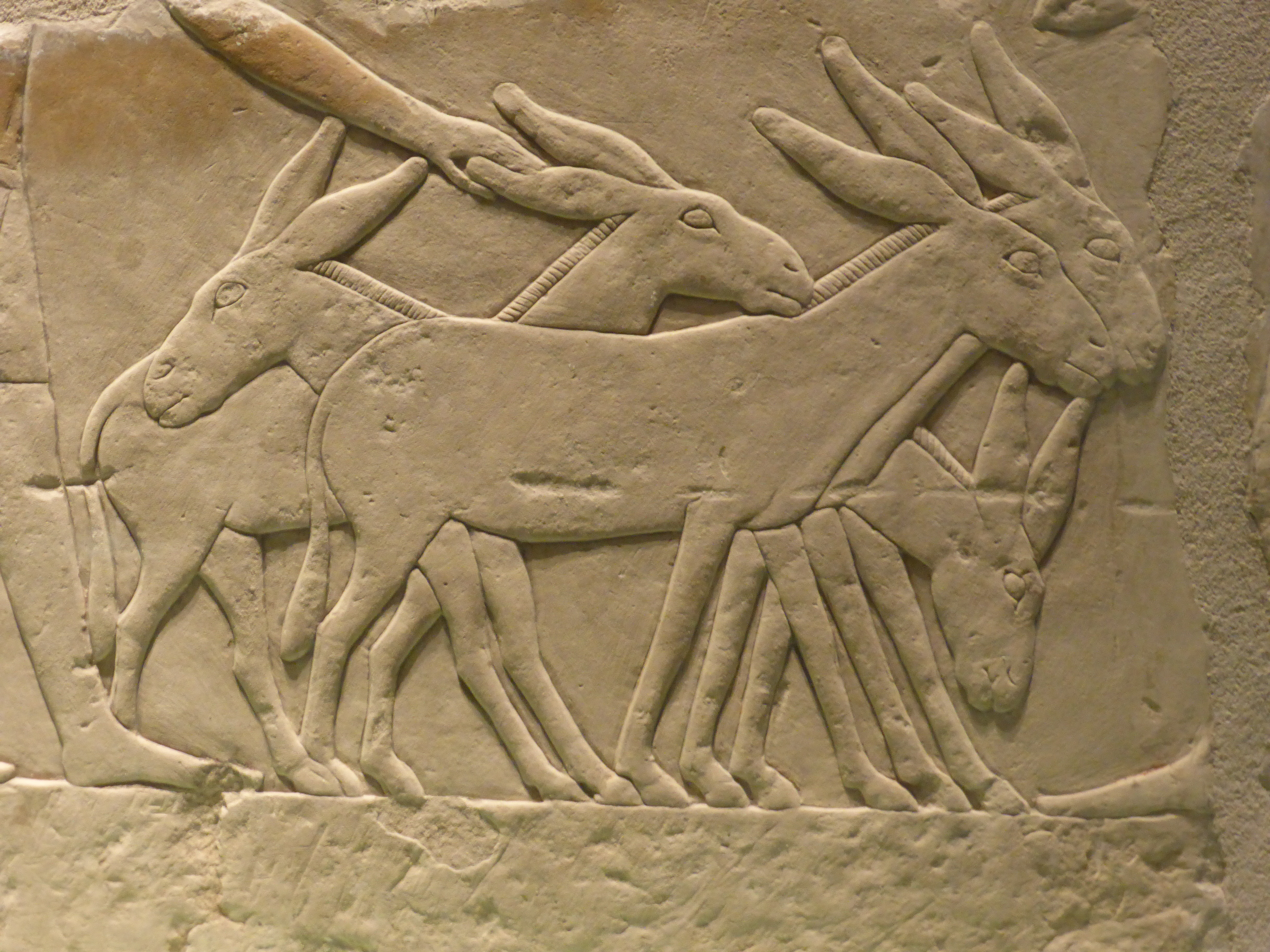 En el Museo Egipcio de Berlín (en alemán: Ägyptisches Museum und Papyrussammlung), se conserva este relieve donde vemos unos burros o asnos. Procede de la Necrópolis de Guiza, tumba de Seshemnefer IV, del Imperio Antiguo (2347-2216 a. C.). Es un fragmento de un relieve representando una escena de cosecha. Número de inventario del museo: 1129. Esta pieza se ha exhibido temporalmente en Santiago de Chile, en 2016, en el Centro Cultural La Moneda; pero ya ha sido devuelta a los Museos Estatales de Berlín, al Neues Museum (Museo Nuevo), en la Isla de los Museos de Berlín.